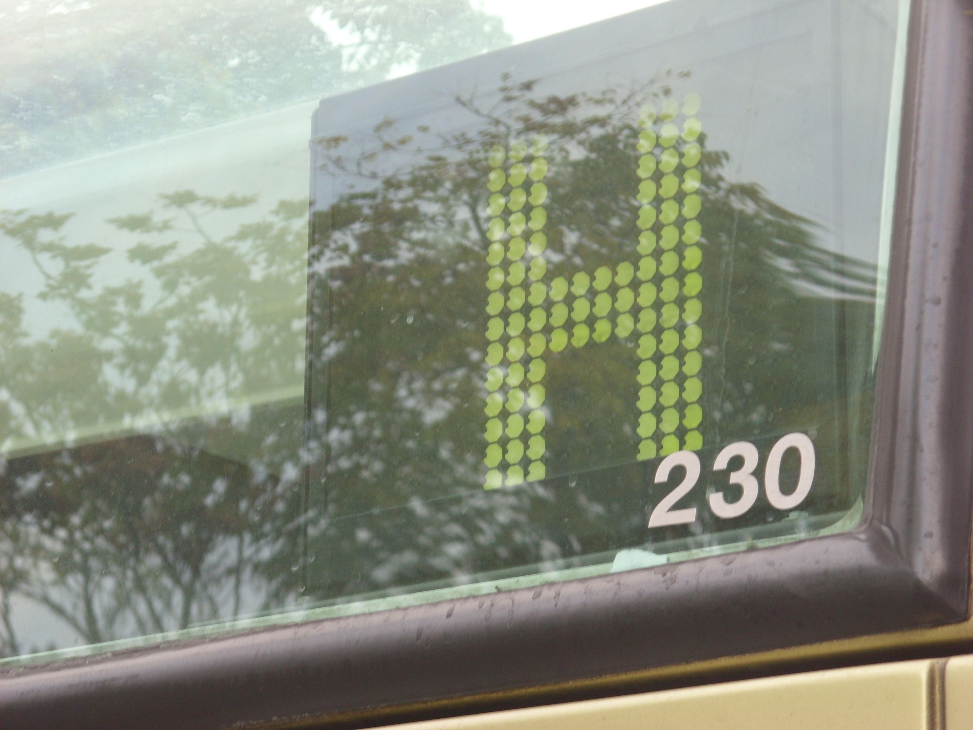 Gros plan sur un bloc girouette arrière à pastilles sur un Agora S des TUR